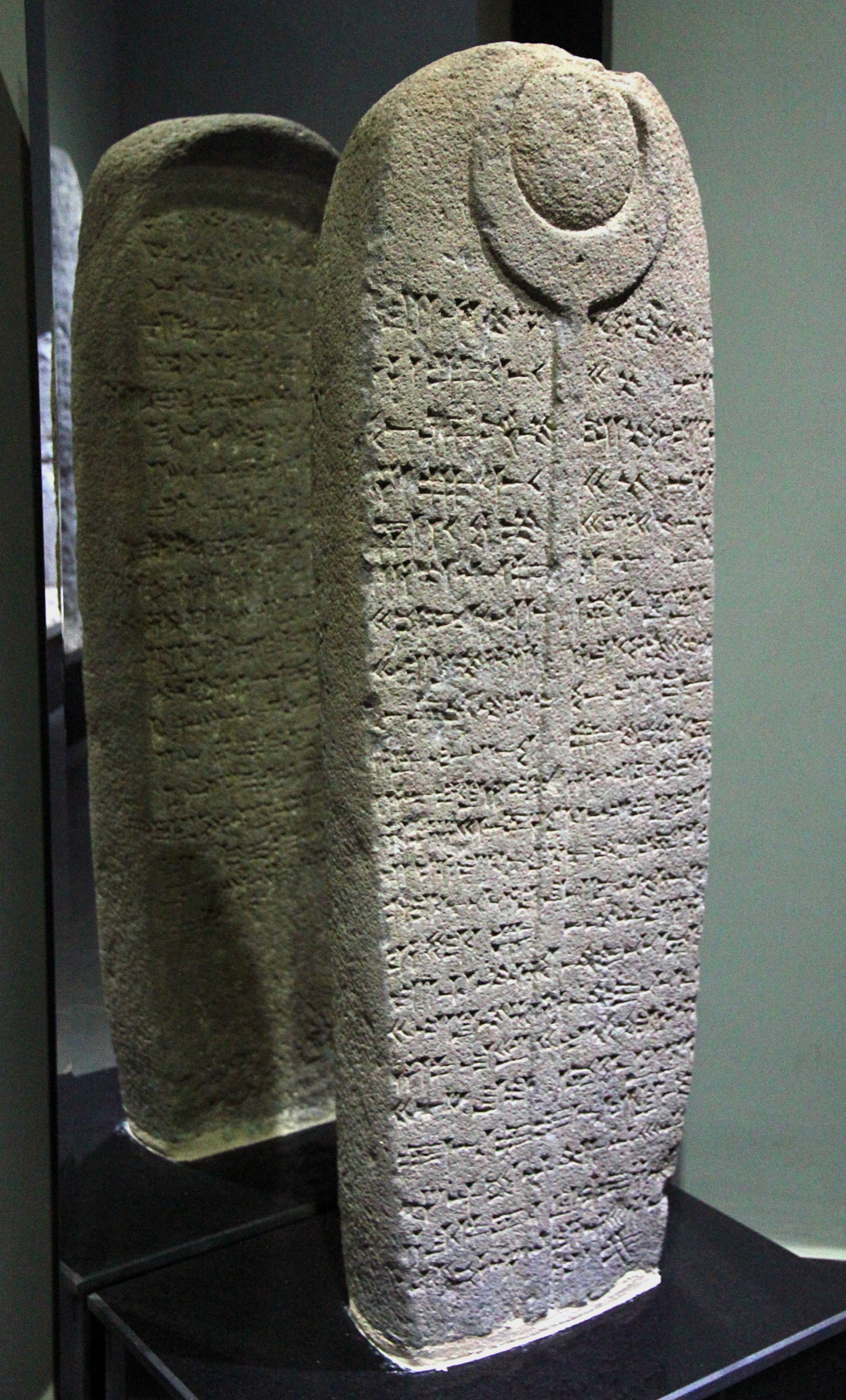 Archäologisches Museum Kahramanmaraş, Türkei, Keilschrift-Stele des assyrischen Königs Adad-Nirari III. (810-783) aus Kizkapanli bei Gözlügöl, südöstlich von Kahramanmaras